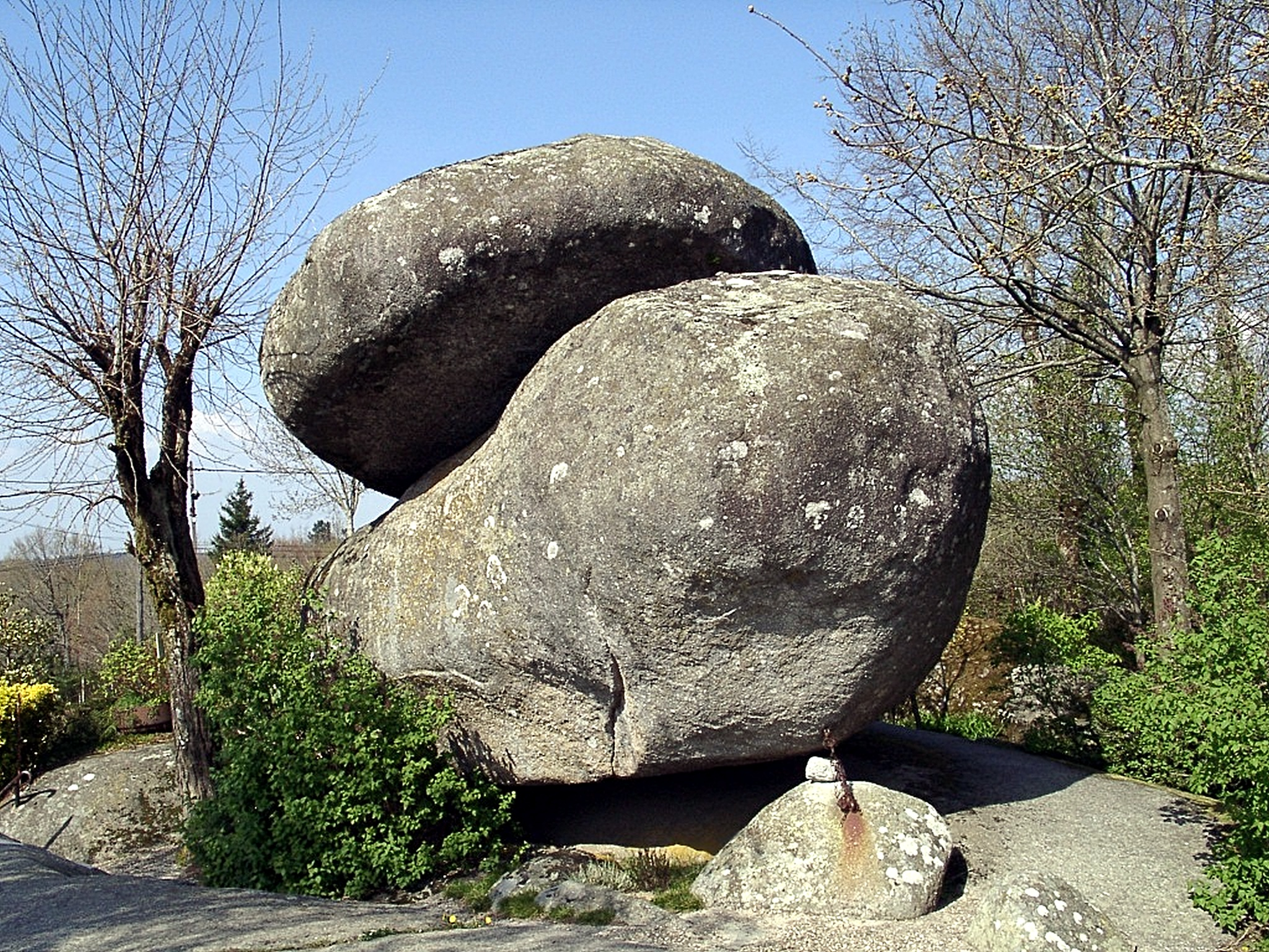 Le Rocher tremblant des Sept Faux